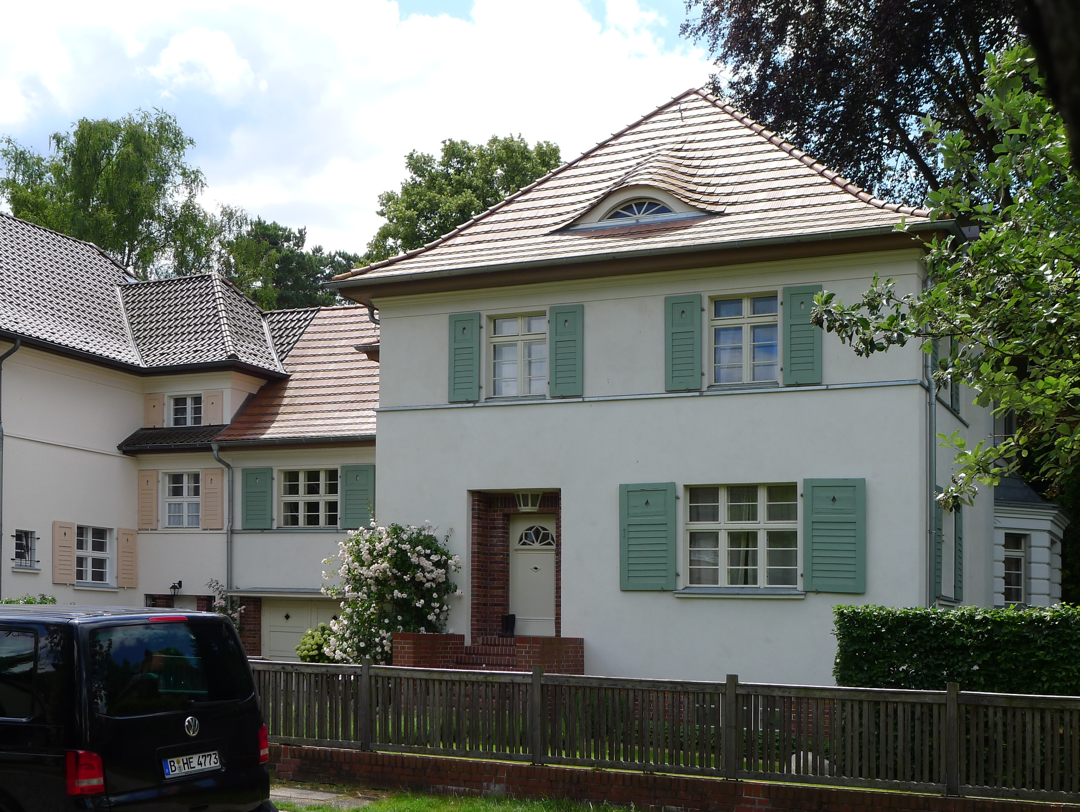 Doppelwohnhaus